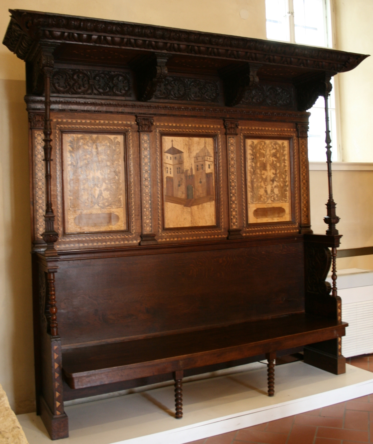 snimljeno u u Muzeju grada Zagreba